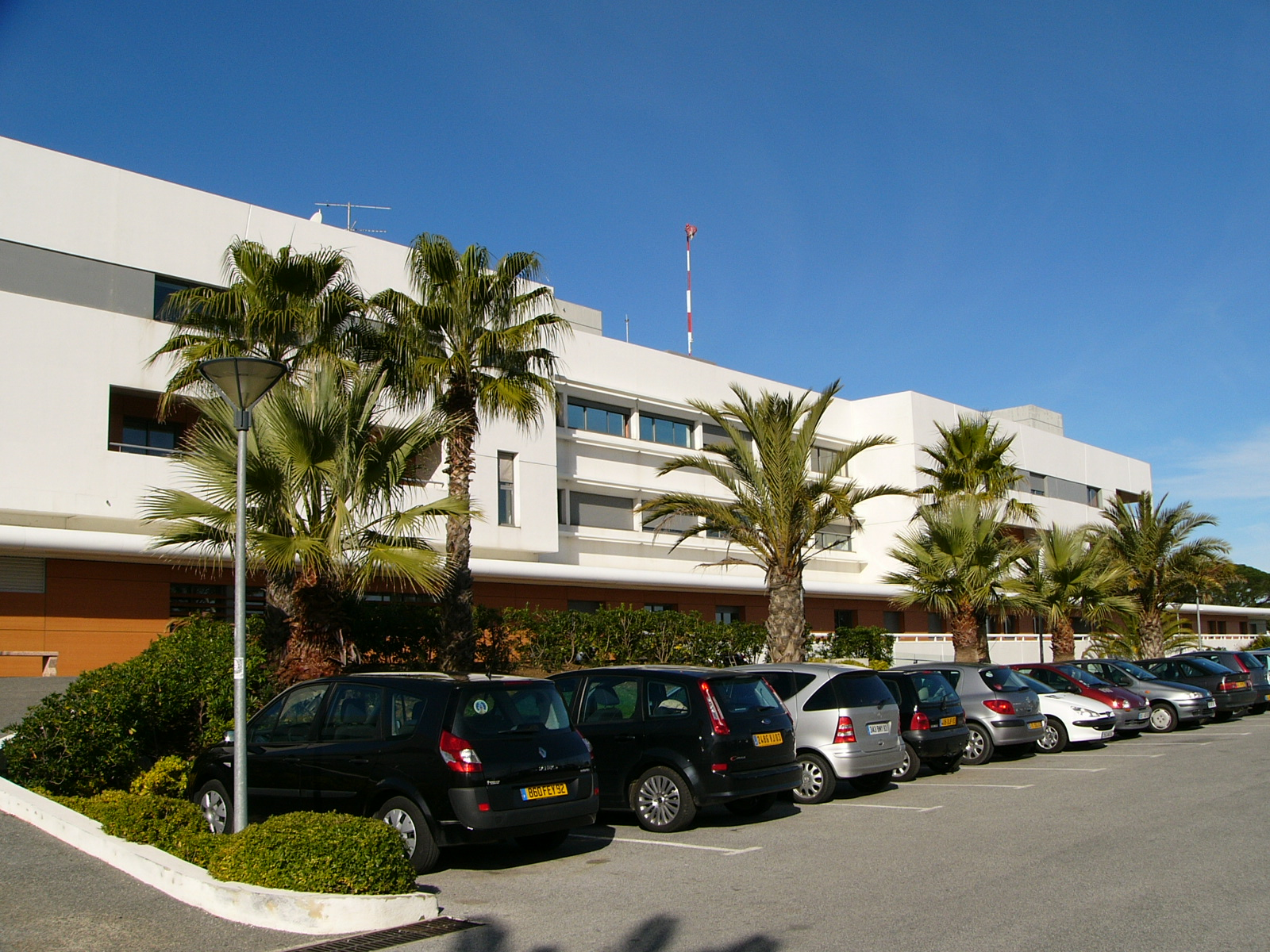 Vue du pôle de santé et du parking